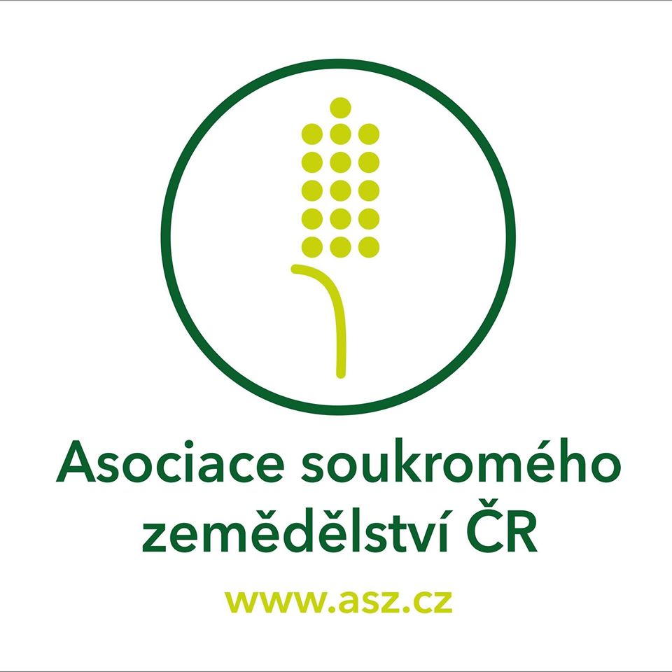 Asociace soukromého zemědělství